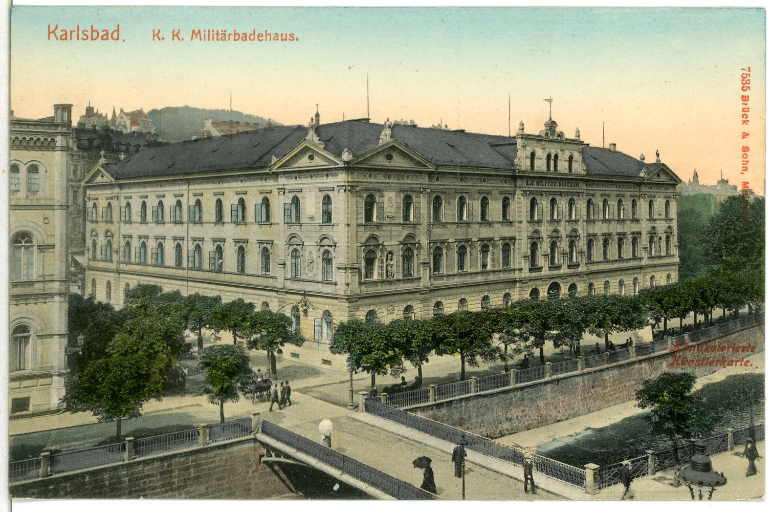 Karlsbad; Militärbadehaus This postcard is from publisher Brück & Sohn in Meißen ( This postcard has a unique number 07535 and is available in a higher resolution at the publisher. This images was uploaded in a cooperation project between Wikipedians and the publisher.